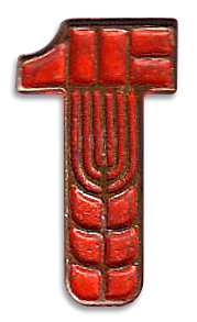 פטיש ההסתדרות, סיכת-דש של חבר וועידה